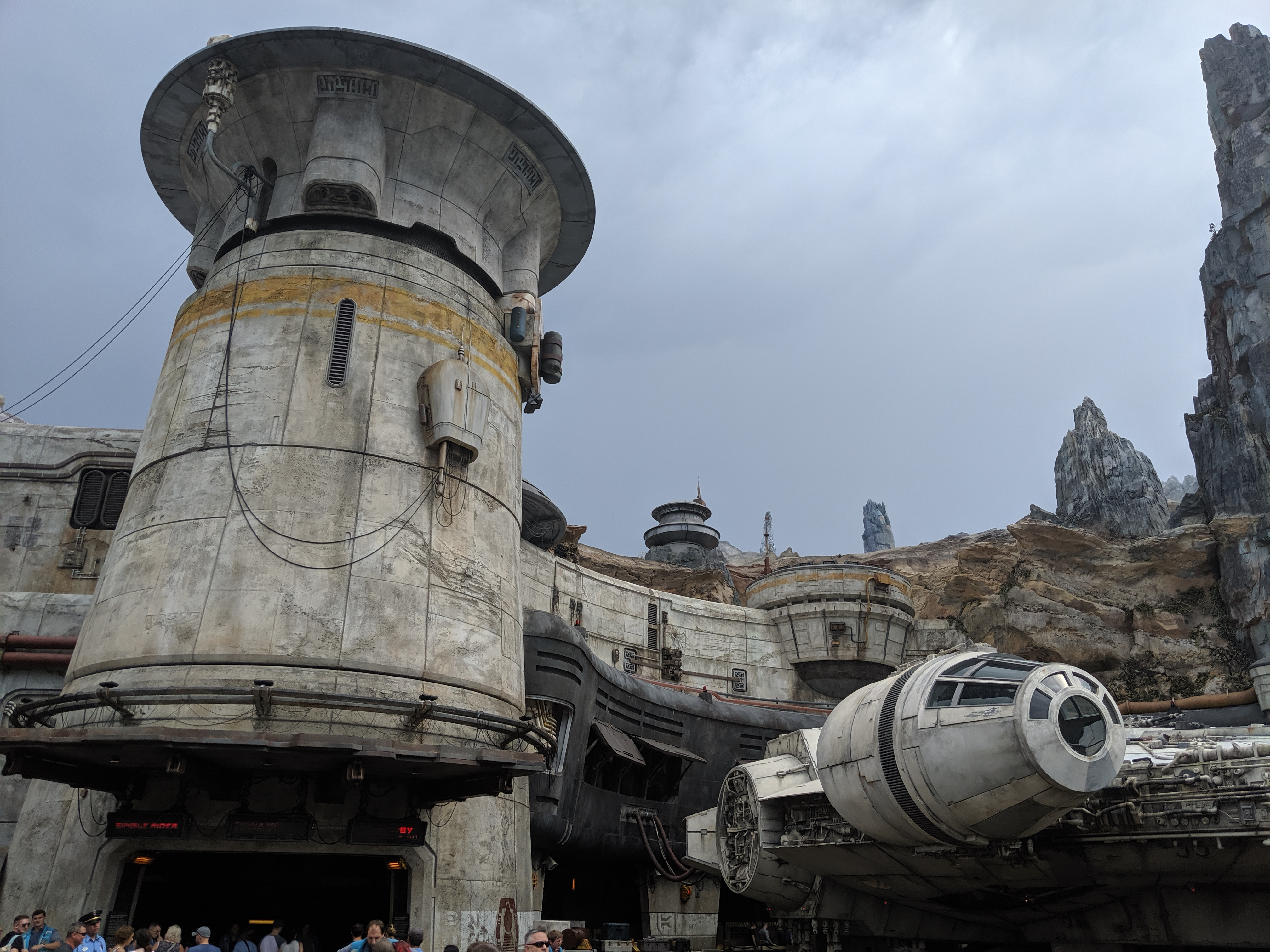 Millennium Falcon: Smugglers Run Entrance